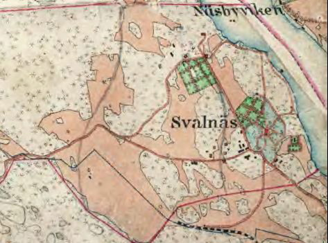 Svalnäs på Häradsekonomiska kartan